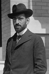 Depicted person: Roque González Garza